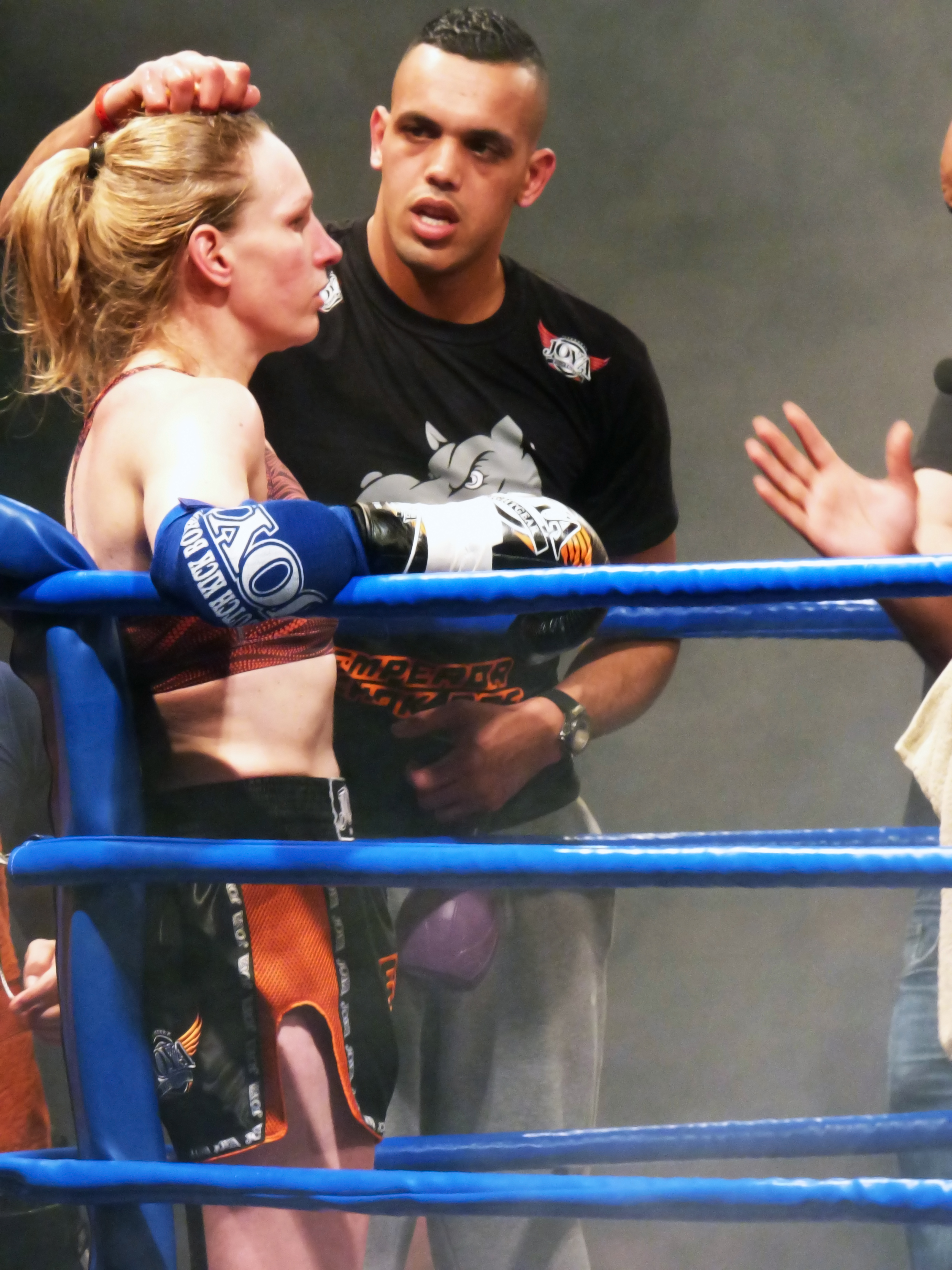 Boxe Thaïlandaise 2016 gala vandoeuvre